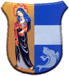 Herb gminy Kunice.